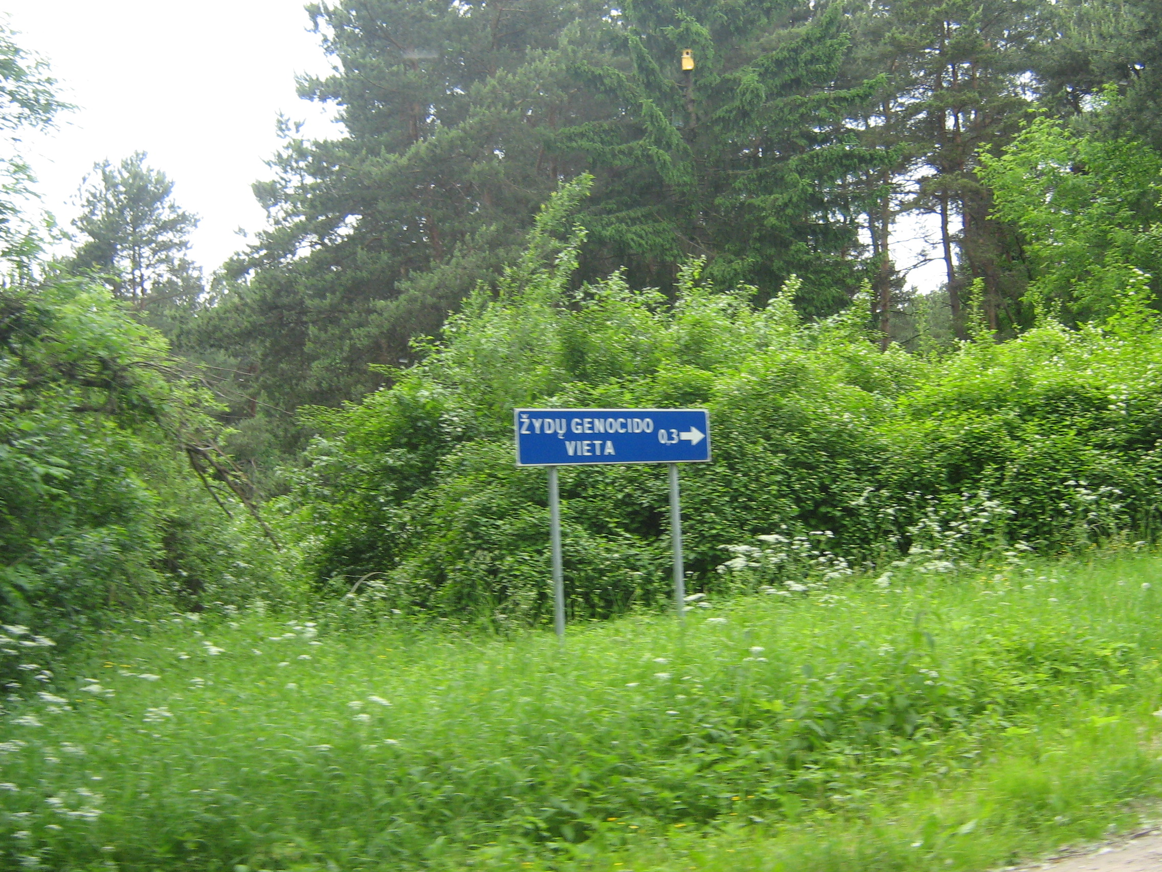 Jonavos žydų genocido vietos iškaba